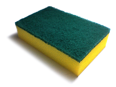 Urethane_sponge(ウレタンスポンジ)